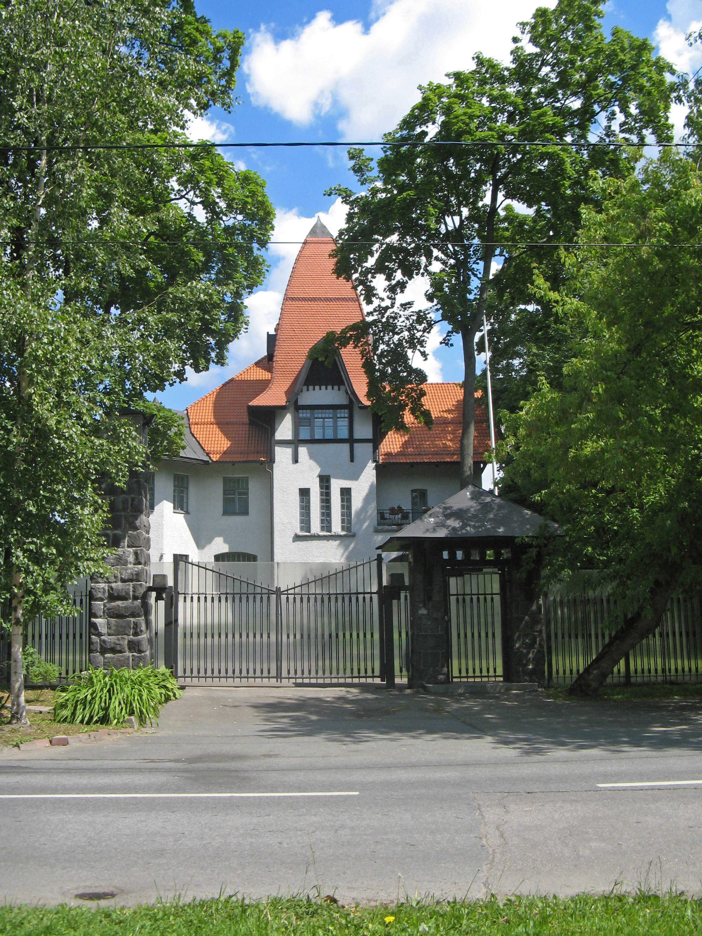 Усадьба Фолленвейдера: Большая аллея, 13, Петроградский район, Санкт-Петербург